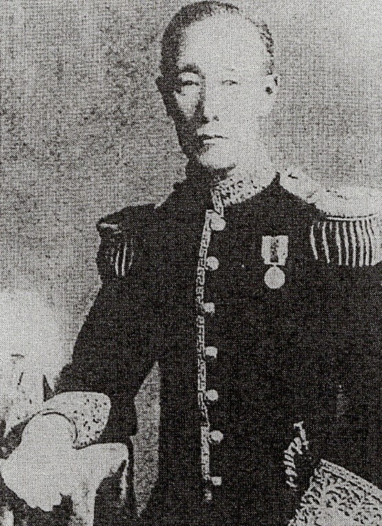 阿波徳島藩洲本城代稲田家16代当主・稲田邦植の肖像写真。